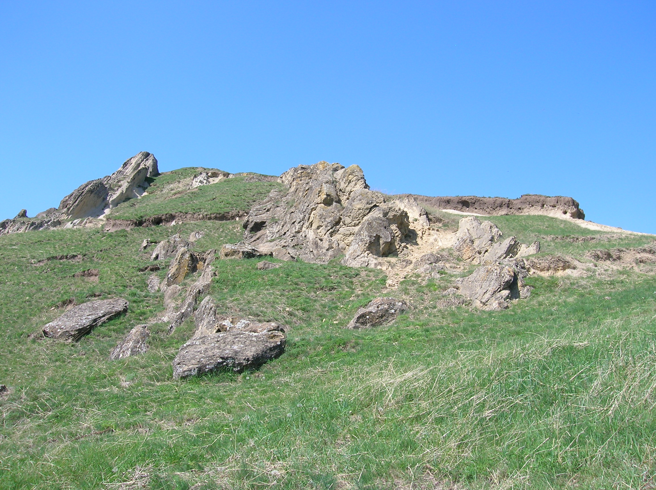 Stânca Şerbeşti, Comuna Ştefan cel Mare, Judeţul Neamţ - Spre vârf